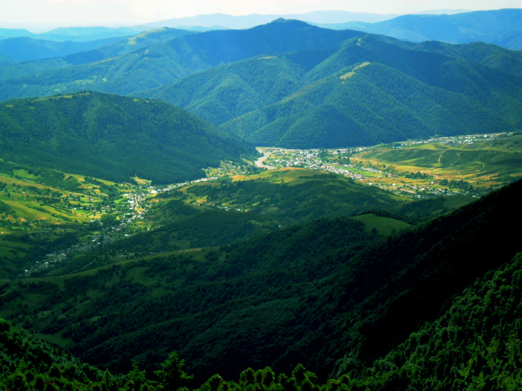 Фото села Колочава з гори Стримба від 2011 року.